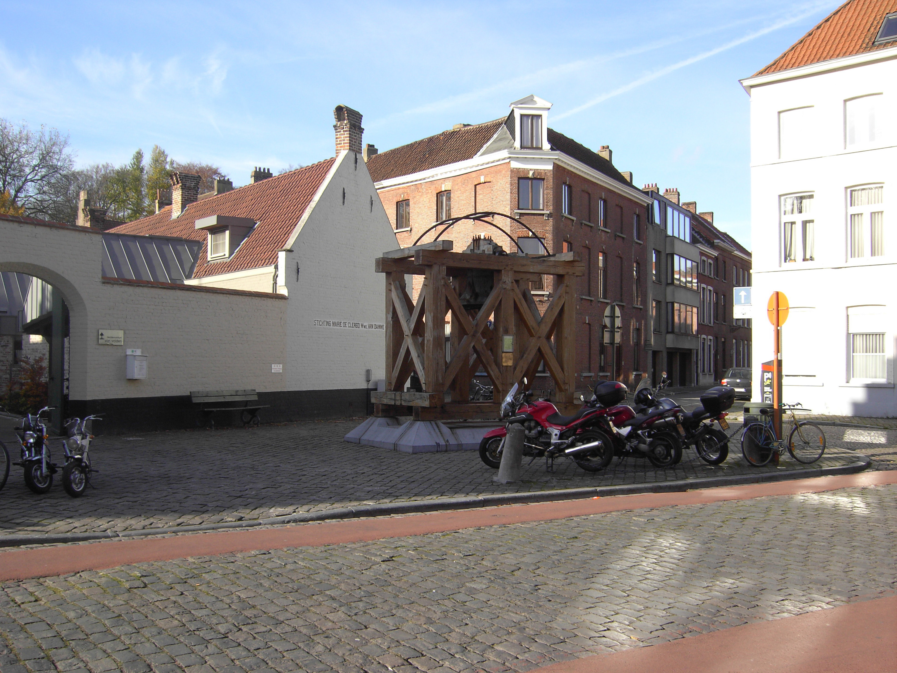 Het Dumeryplein te Brugge - West-Vlaanderen - België